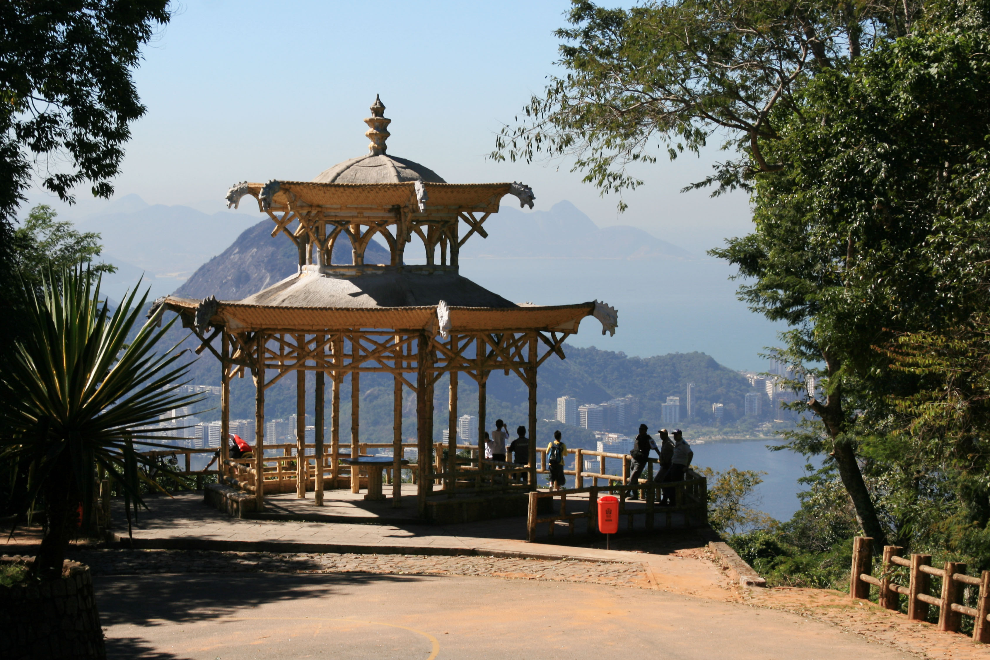 Pavilhão em estilo oriental (Pagode) localizado na Estrada Dona Castorina. Projetado em 1903 pelo arquiteto paisagista Luis Rey, a pedido do então prefeito Pereira Passos com o fito de criar um ambiente condizente com o local, que desde os princípios do século XIX era conhecido como vista dos Chins ou Chineses. É em estilo Neo-Chinês, e substitui o pagode de bambu que ali existia (RioTur/Milton Teixeira)